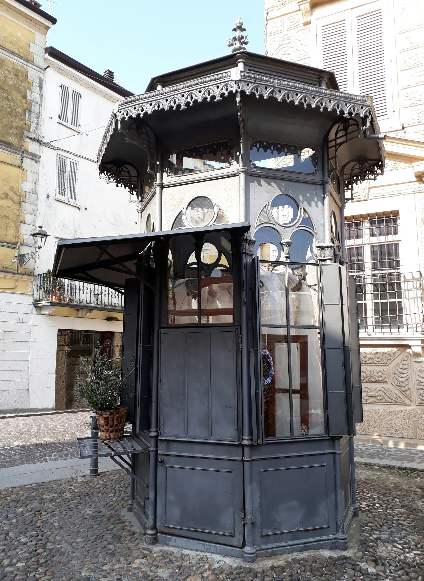 Mantova, antica edicola liberty in Piazza Canossa.